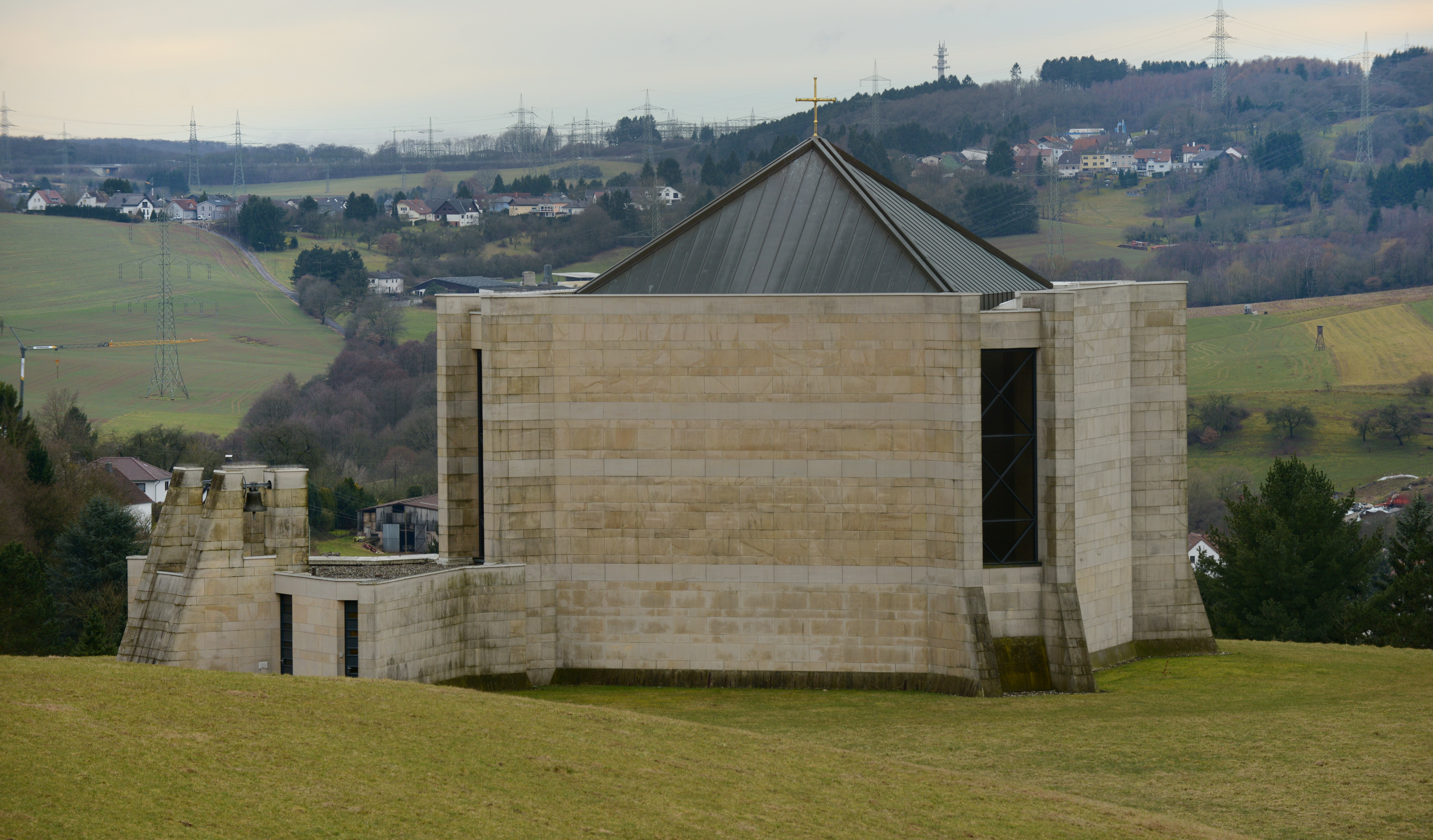 Sakralbau Statio Dominus Mundi in Wustweiler, Gemeinde Illingen, Saarland/ Deutschland (2018).